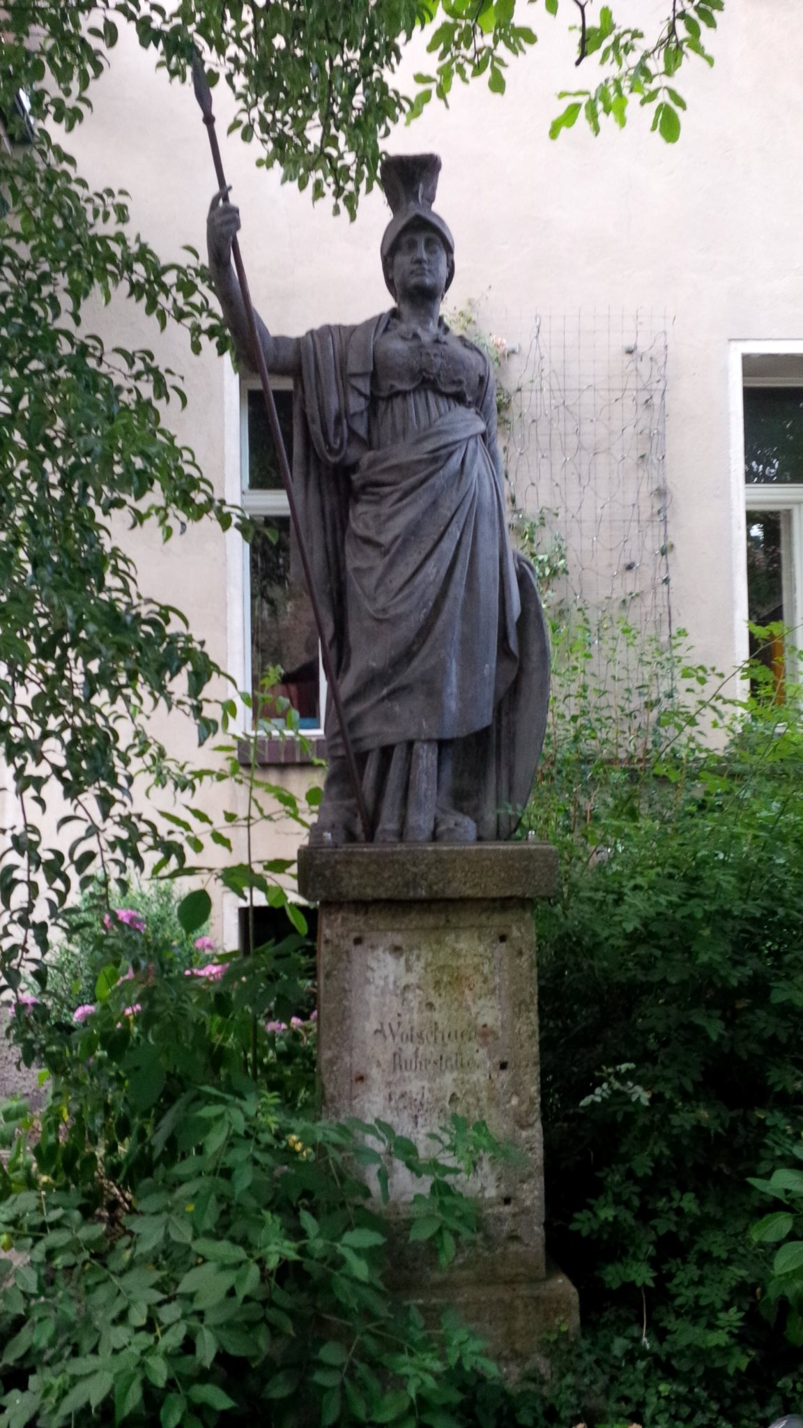 Statue der Göttin Minerva, Bleiguss von Joseph Kirchmayer im Innenhof vor dem "Seidel-Saal" in Sulzbach-Rosenberg